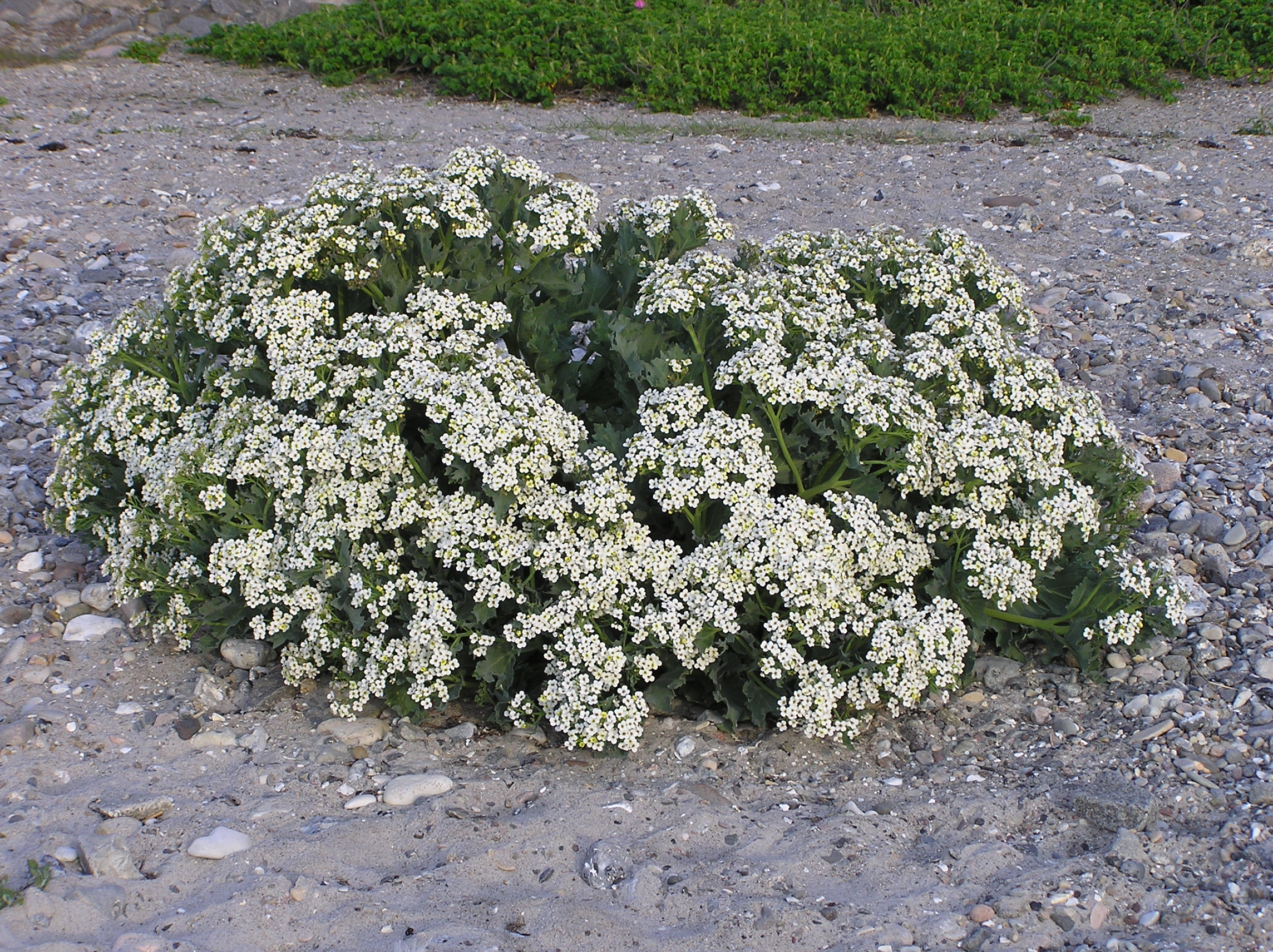 Echter Meerkohl, Strandkohl, Seekohl, Crambe maritima :Standort: Naturschutzgebiet Oehe-Schleimünde